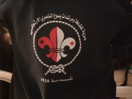 סמל תנועת הצופים הקטולים בישראל